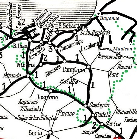 Euskal Herriko burdinbide sarea (1921), indarrean ziren lineak. Iturria / source: File:Map of the portuguese and spanish railways.jpg Egilea / Author: Röll, Freiherr von: Enzyklopädie des Eisenbahnwesens, Band 9. Berlin, Wien 1921, S. 85-94.